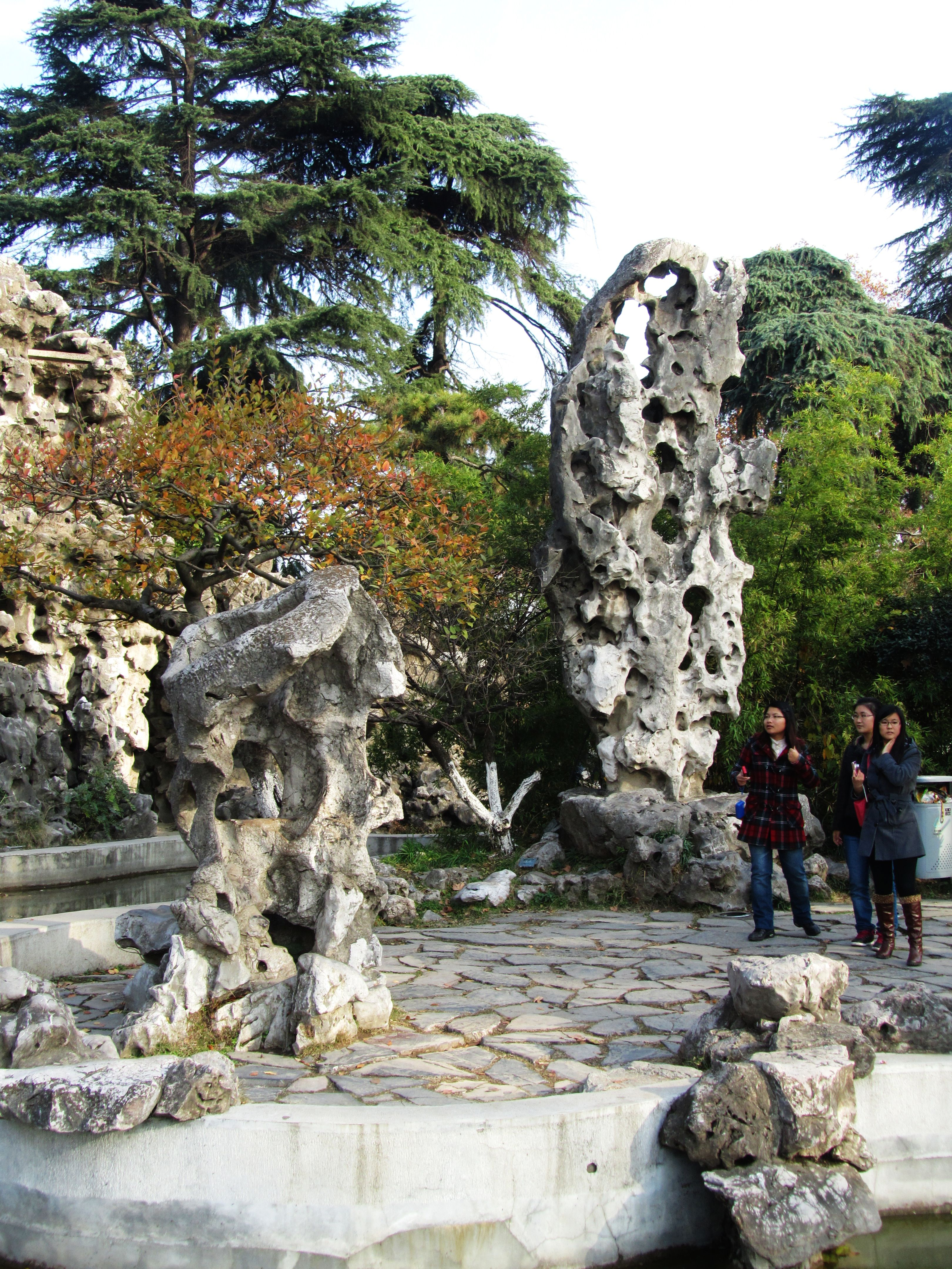 南京玄武湖环洲，童子拜观音石。